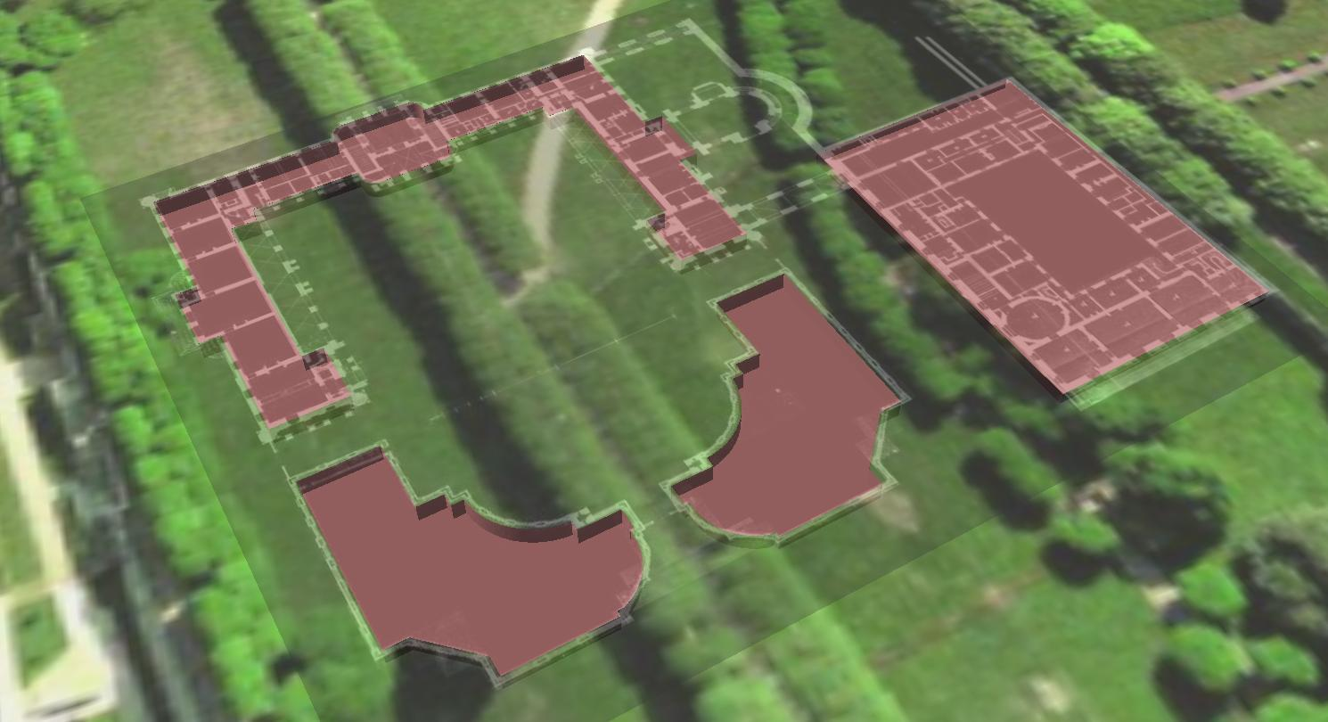 Schéma projetant l'emprise des débris archéologiques de Meudon.